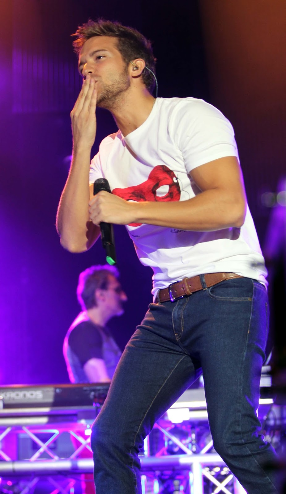 pablo alboran lanzandole un beso a sus admiradoras